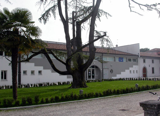 Ristrutturazione e restauro del complesso di Villa Dora a San Giorgio di Nogaro (Udine). Vista delle barchesse. Unknown